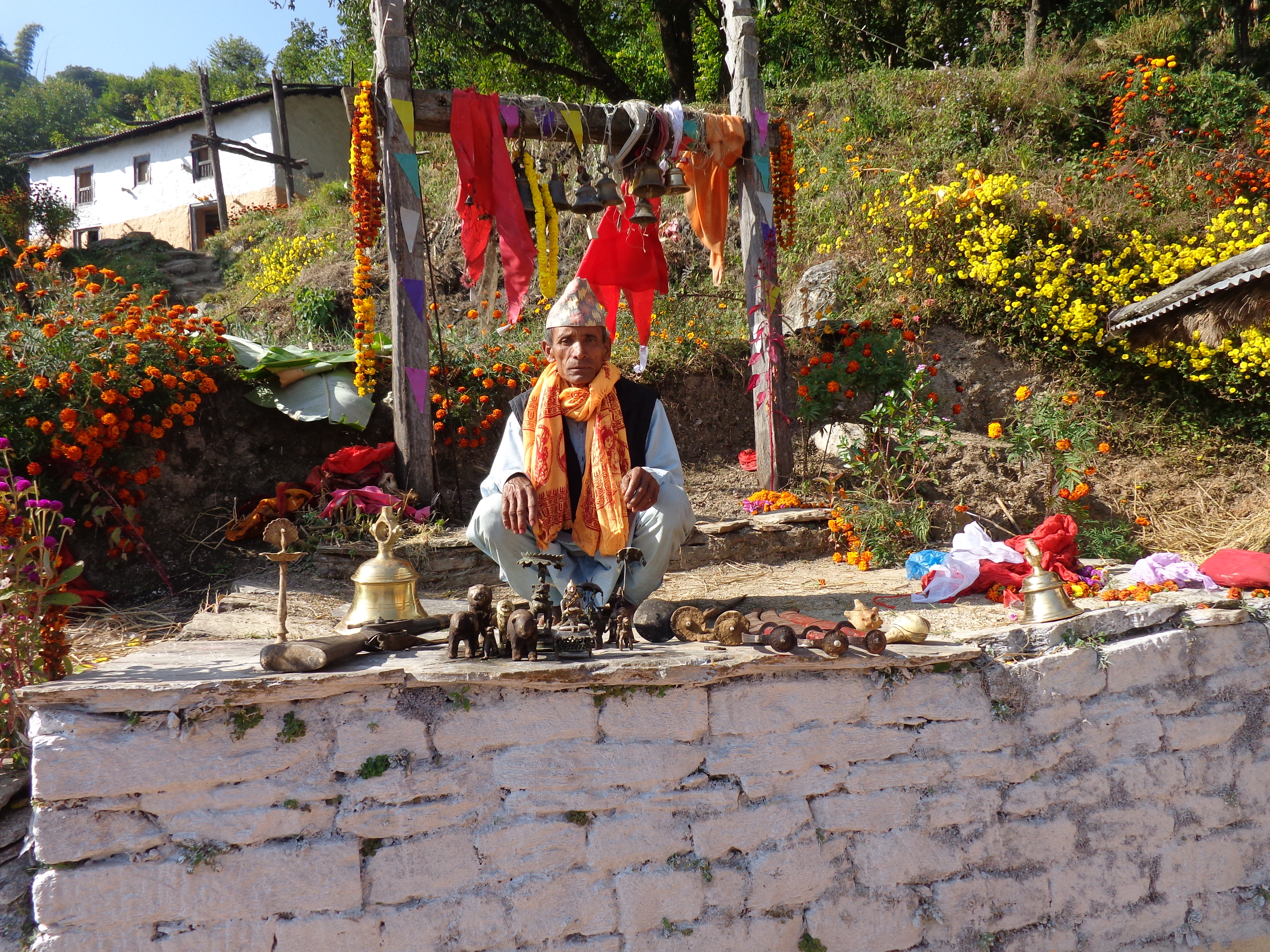 नेपाल भाषा: Nepal Doti Kartikeya Dewata